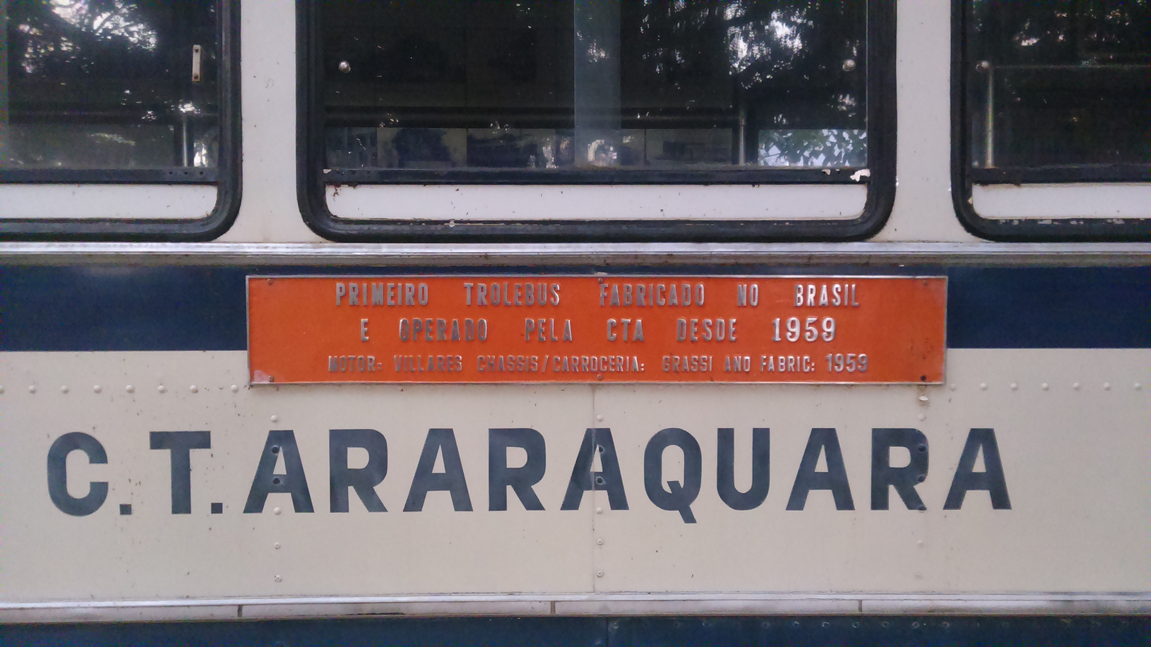 imagem ampliada da lateral